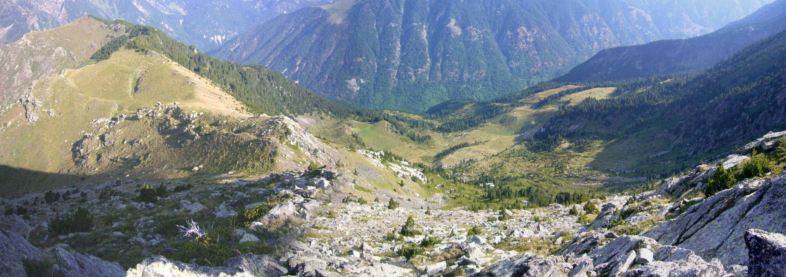 Pletius de Casesnoves vistos des de la Serra de Llats; la Vall de Boí, Alta Ribagorça, Catalunya